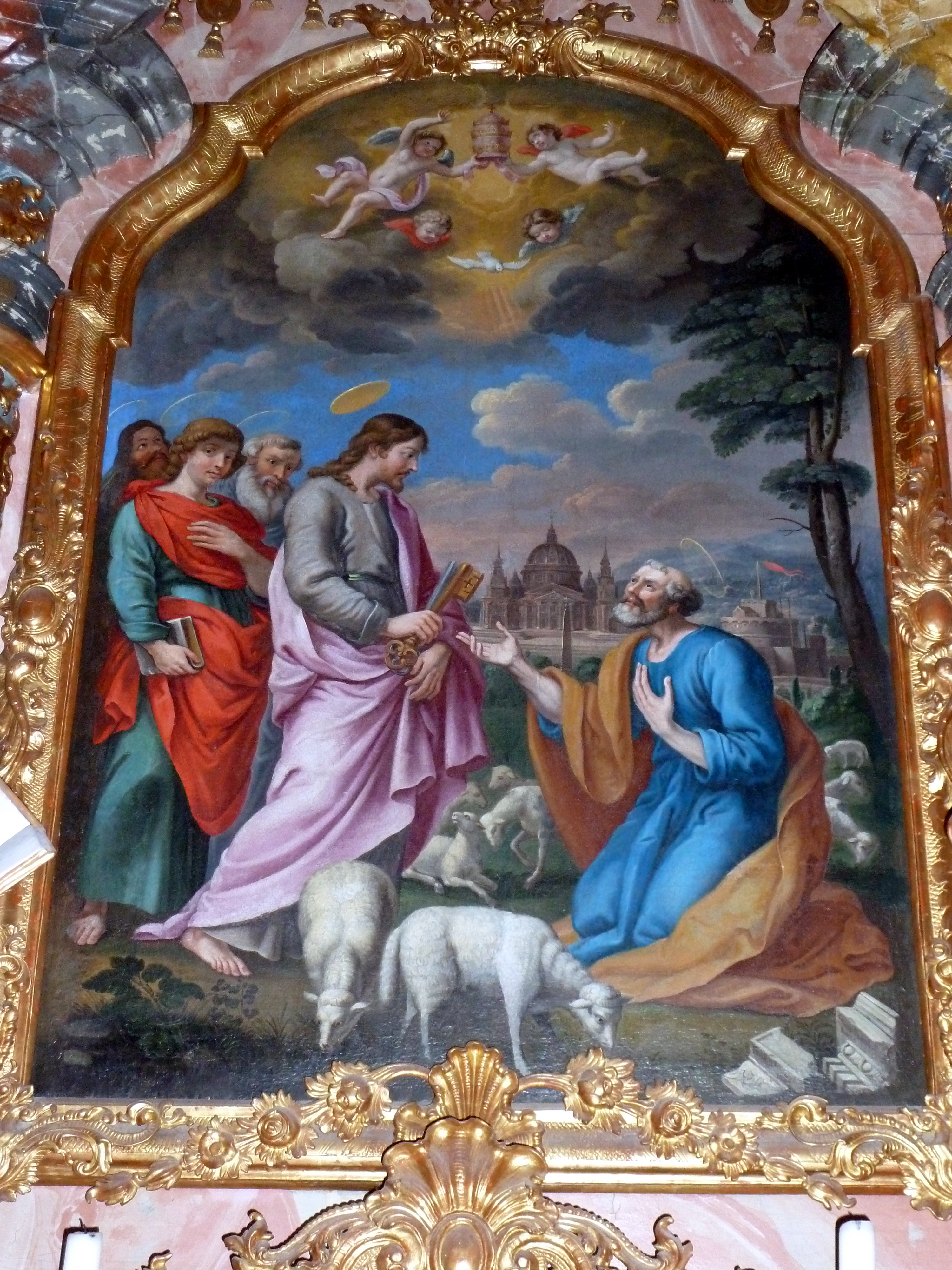 St. Peters-Altar in der Benediktiner Klosterkirche Muri, Kanton Aargau, Schweiz. Der Altar in der nordöstlichen Oktogonnische unter dem Orgelempore ist möglicherweise ein Werk des Bildhauers Johann Michael Winterhalter (1706-1759) von 1745/46 in Rokoko-Stil. Die Altargemälde wurde von Simon Bachmann (Invetor) 1651 entworfen und von Rudolf Schwerter (Maler) 1652 gemalt, am Bild ist die Einsetzung des Apotel Petrus ins Hirtenamt Jesus bei der Schlüsselübergabe zum Himmelsreich zu sehen, neben Jesus steht der Evangelist Matthäus mit seinem Attribut, dem Buch, im Hintergrud wird die St. Peters-Basilika (Basilica di San Pietro) des Vatikans dargestellt, oben halten zwei Engel die päpstliche Tiara-Krone. Die Statuen stellen St. Antonius (links) und St. Wendelin (rechts) im Mönchshabit und mit einem Rind des ehemaligen Hirten dar. (Literatur: Die Kunstdenkmäler des Kantons Uri, Band V, Der Bezirk Muri, Birkhäuser Verlag Basel, 1967, Seite 272-274)